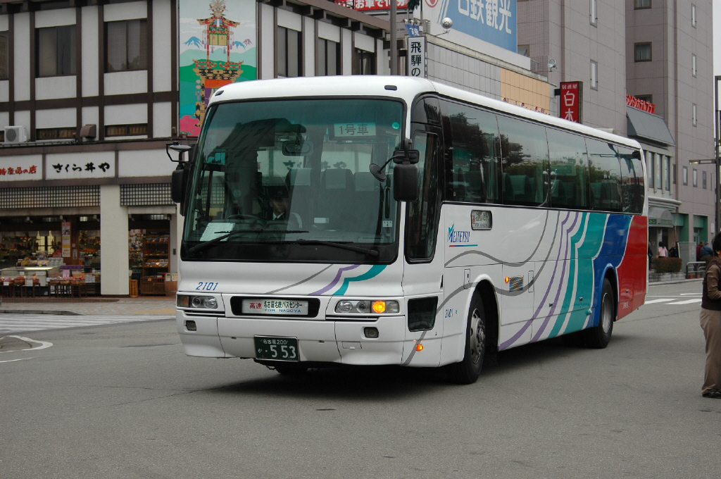 高山駅前にて